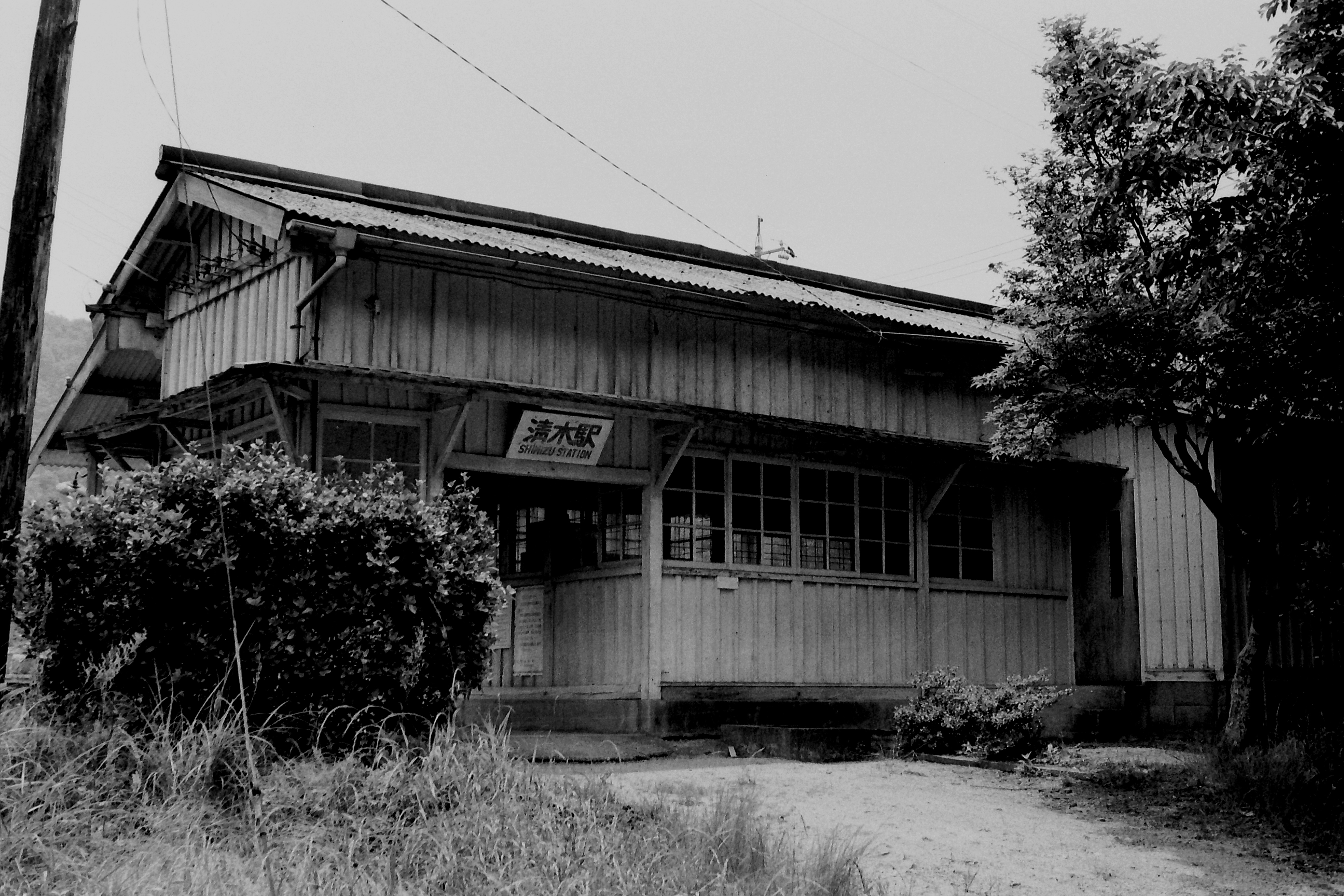 同和鉱業片上鉄道清水駅本屋、1990年6月撮影